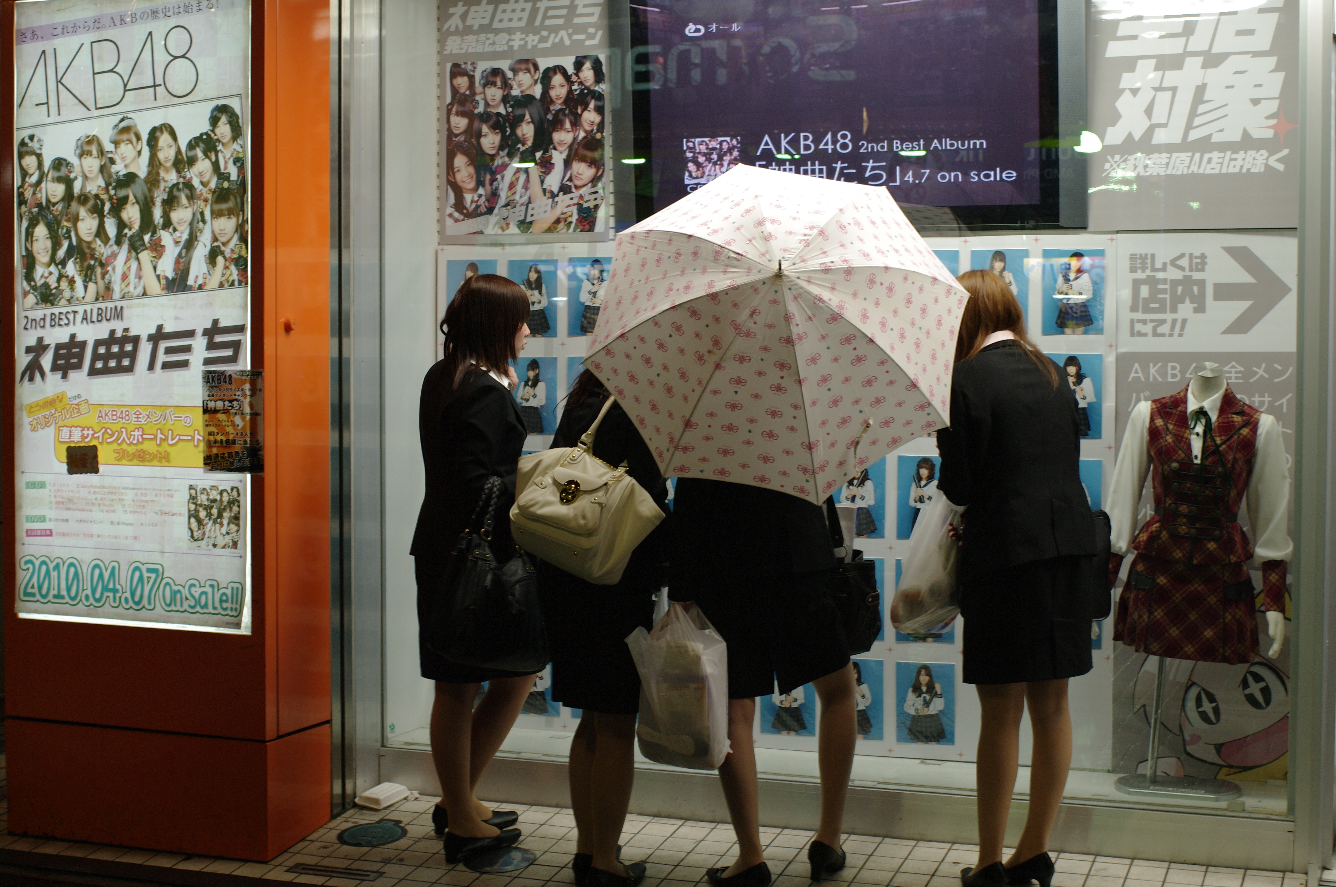 昨日もいた、意外と女の子に人気があるらしい